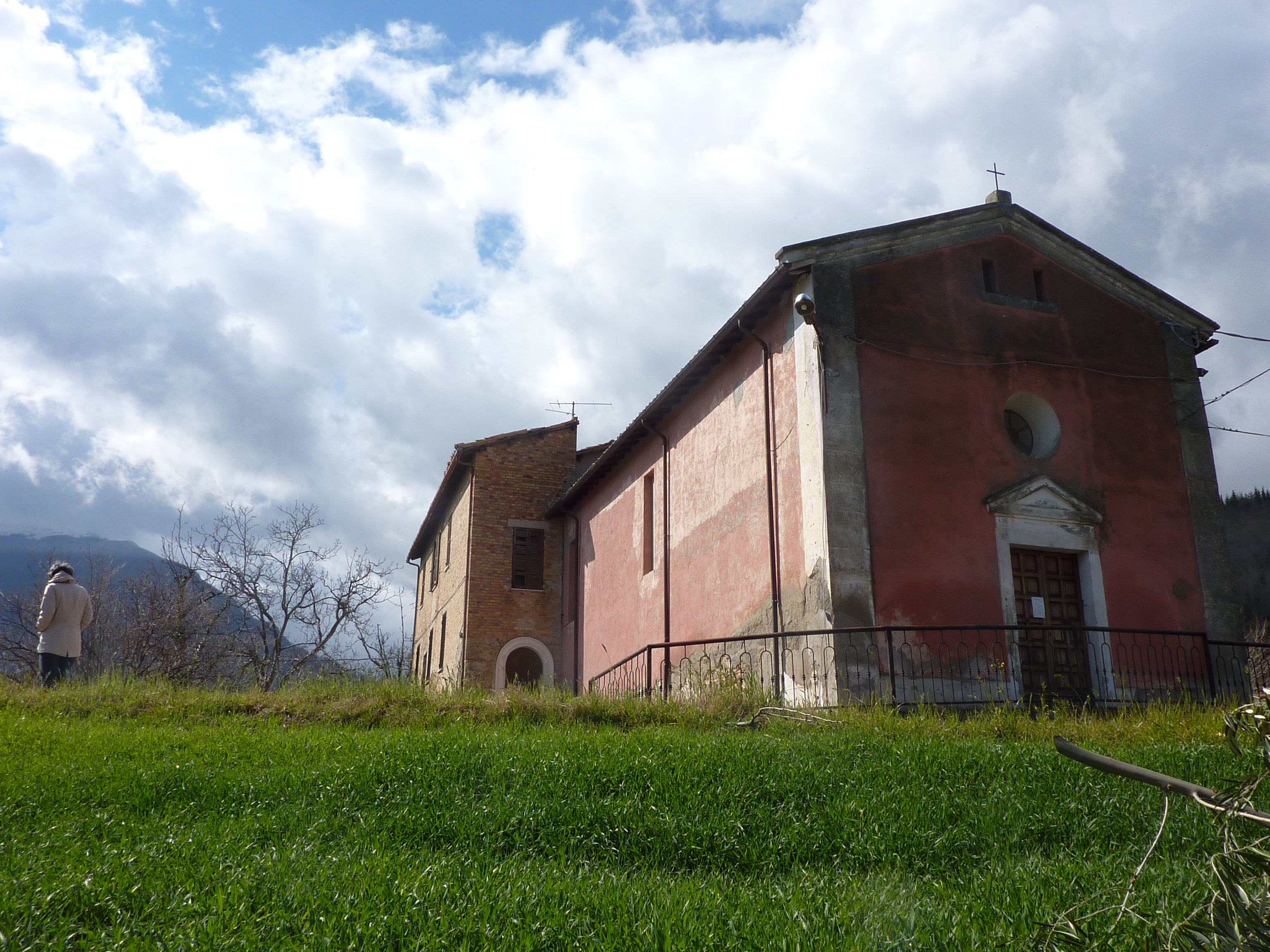 la chiesa di Santa Felicita al centro del paese di Rocche, sullo sfondo i monti gemelli